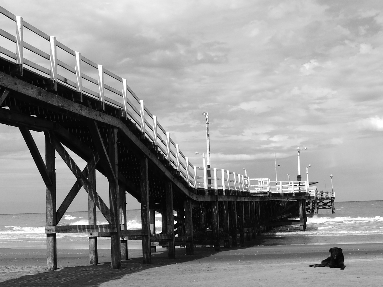 Yo fotografié el muelle de La Lucila del Mar, Buenos Aires, Argentina. El 22 de Diciembre de 2005. Se encuentra disponible para ser utilizada por toda la comunidad. Autor: Ale2006 07:58, 11 July 2006 (UTC)